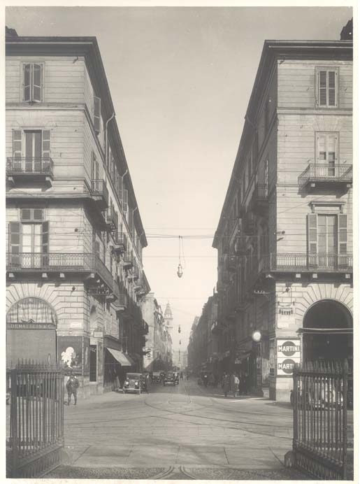 Via Roma, a Torino, vista da piazza Carlo Felice, negli anni Trenta, prima delle demolizioni. Fonte